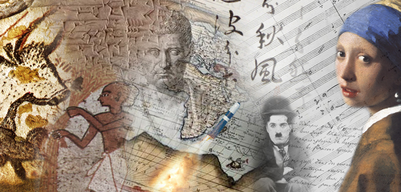 3 eme tentative de bandeau pour le projet culture